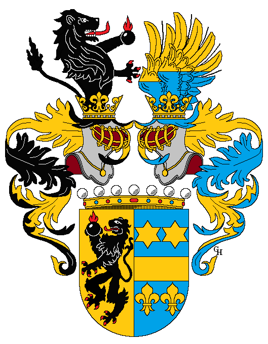 Wappen des k.u.k. Feldmarschalls Alexander Ritter von Krobatin (1849–1933), Kriegsministers von Österreich-Ungarn, verliehen anlässlich seiner Erhebung in den österreichischen Freiherrenstand 1915. Freiherrenstand, Name und Wappen wurden 1916 auf seinen Neffen Alexander Franz Friedrich Krill übertragen, der sich danach "Freiherr von Krill-Krobatin" nennen durfte. Zeichnung von Gerd Hruška ( Für weitere Informationen zu dieser Standeserhebung siehe (